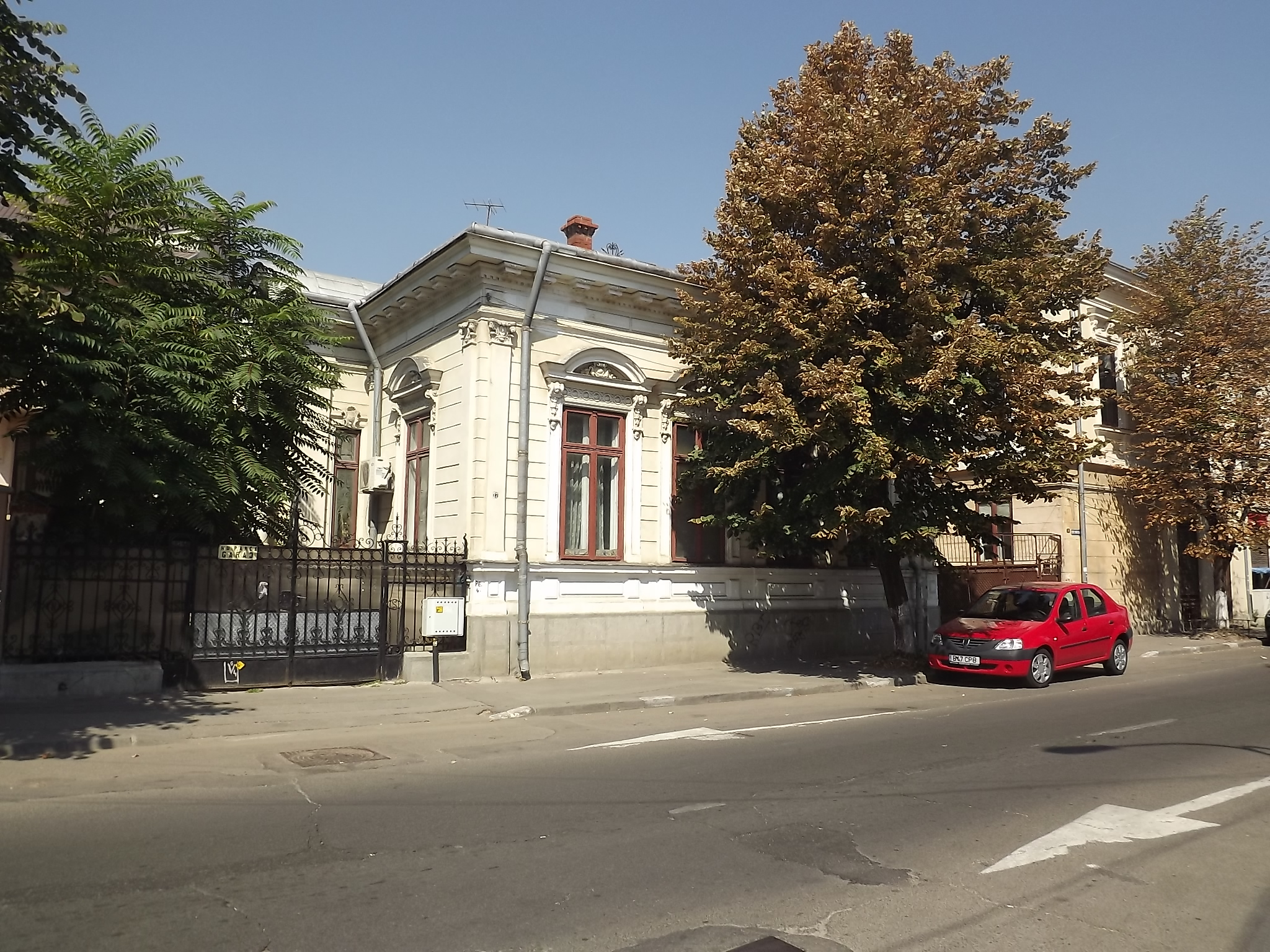 Casă f